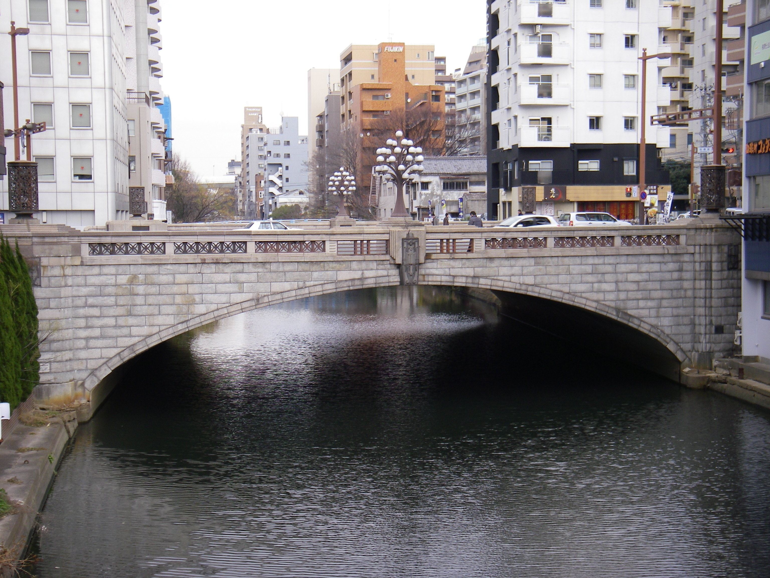 伝馬橋（愛知県名古屋市） 堀川七橋の一つ。中村区、中区に跨る。